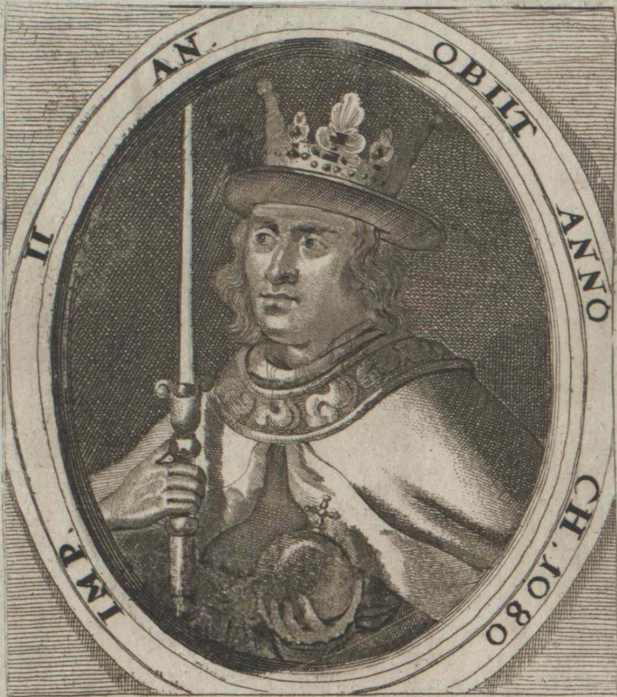 Harald. Hen, König von Dänemark